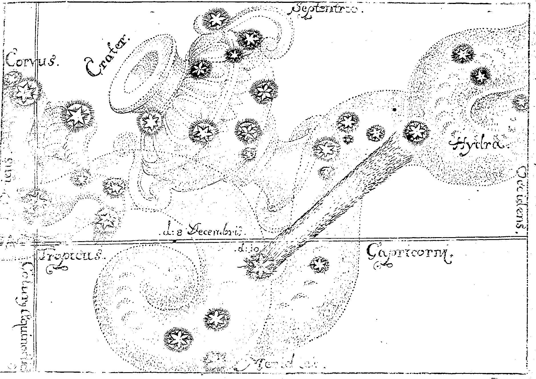 leaflet Einblattdruck Die newe Cometen Seyn gwisse Propheten / Wolmeynend vorgestellet von M. J. H.